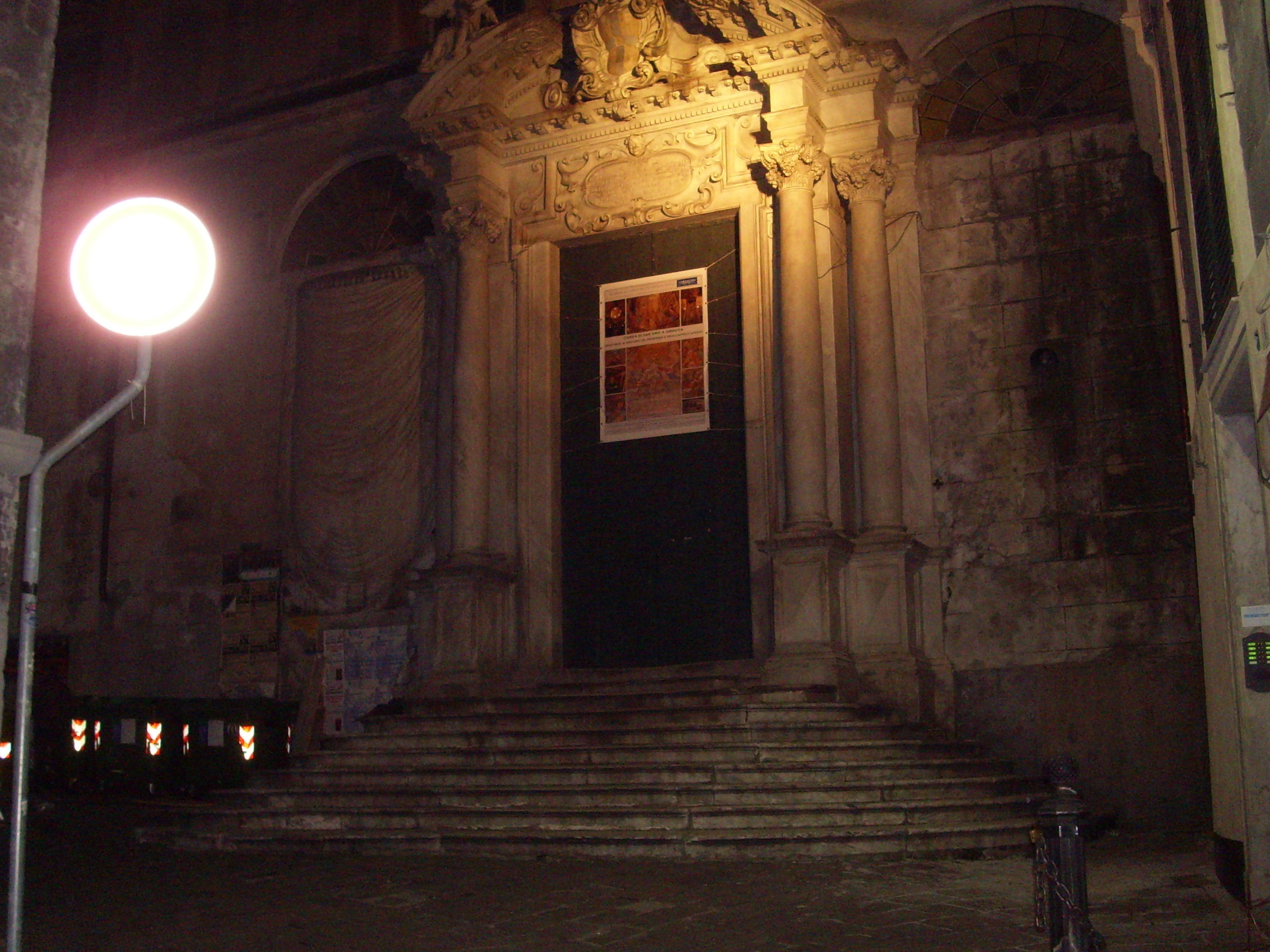 Il portone laterale della chiesa di San Siro, a Genova, fotografato dall'incrocio di via San Luca, Fossatello e San Siro